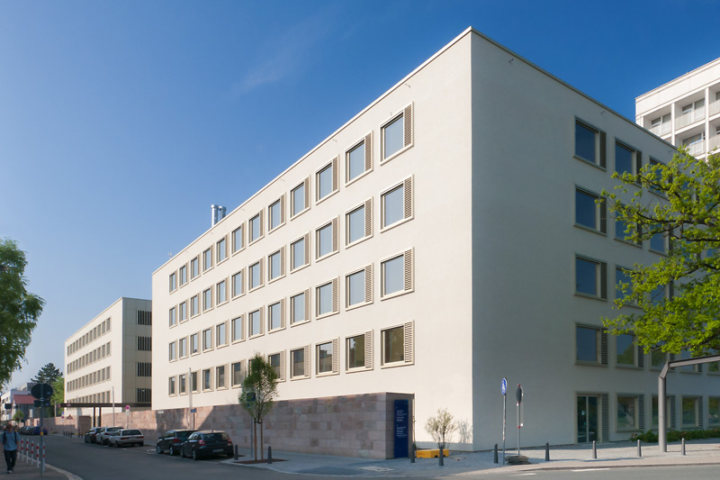 Bettenhaus Uniklinikum Erlangen - Ansicht von Nord-Osten, entlang der Östlichen Stadtmauerstraße